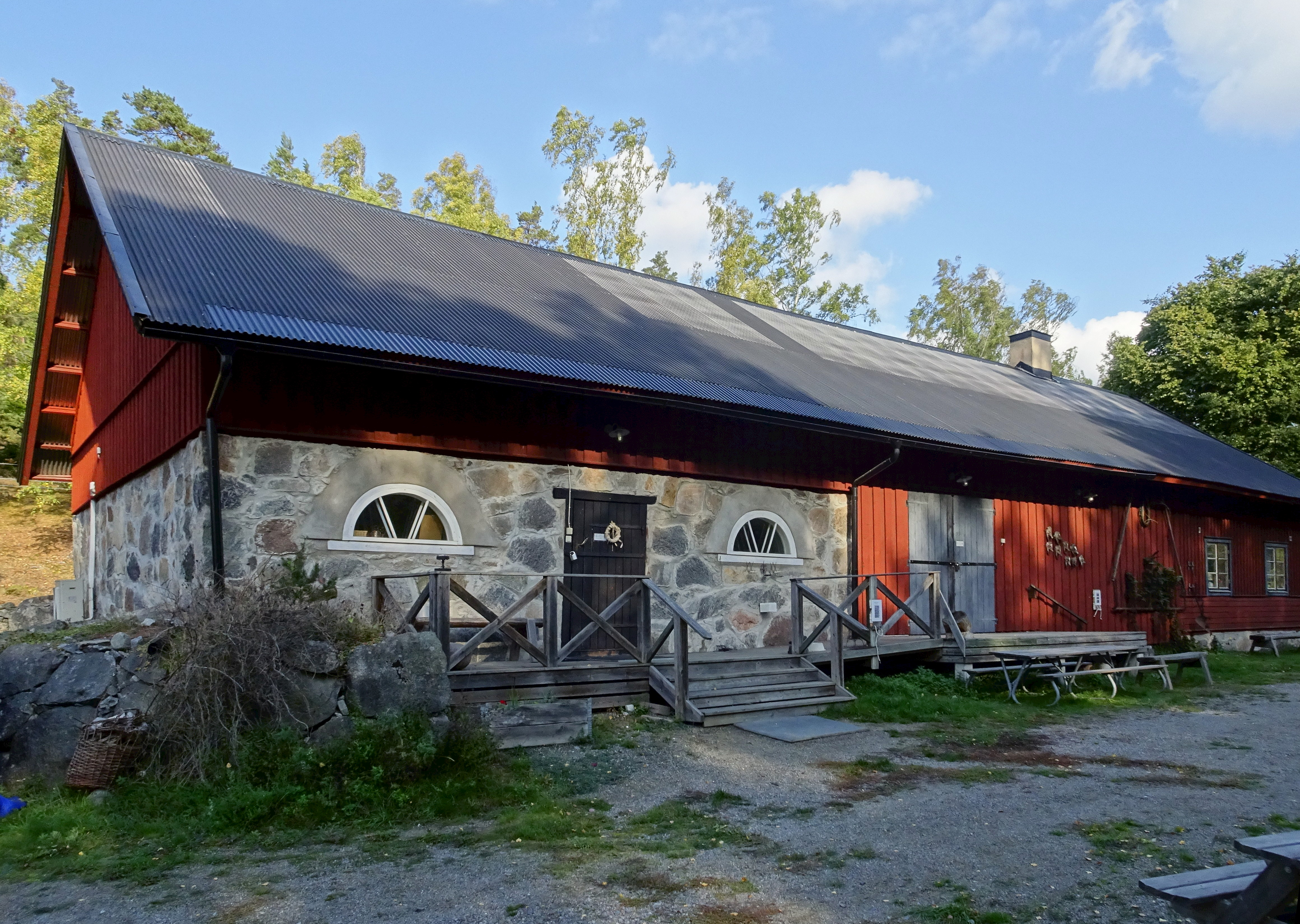 Gålö Gärsar museum på Gålö